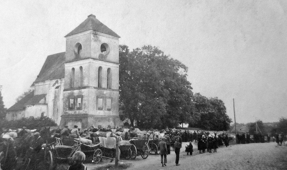 Беларуская (тарашкевіца): Чарнаўчыцы (Čarnaŭčycy), вуліца Берасьцейская (vulica Bieraściejskaja). Касьцёл Найсьвяцейшай Тройцы